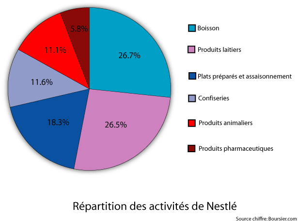 Activité du groupe Nestlé.